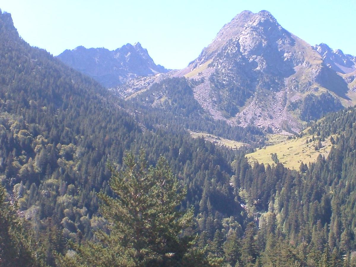 Ribera de Llacs; la Vall de Boí, Alta Ribagorça, Catalunya